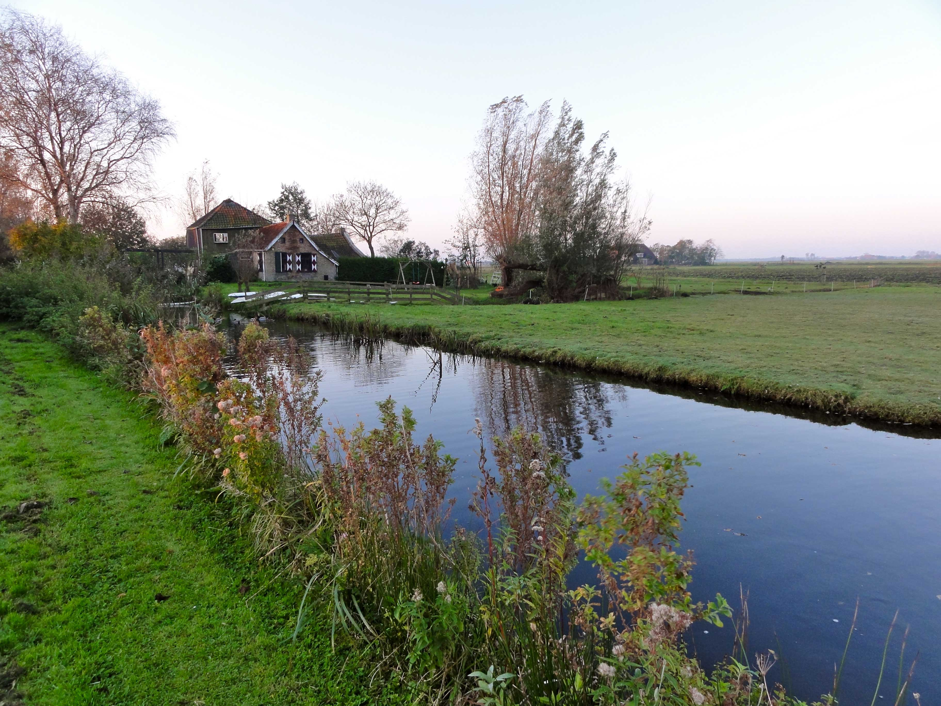 Gieterse Vaart